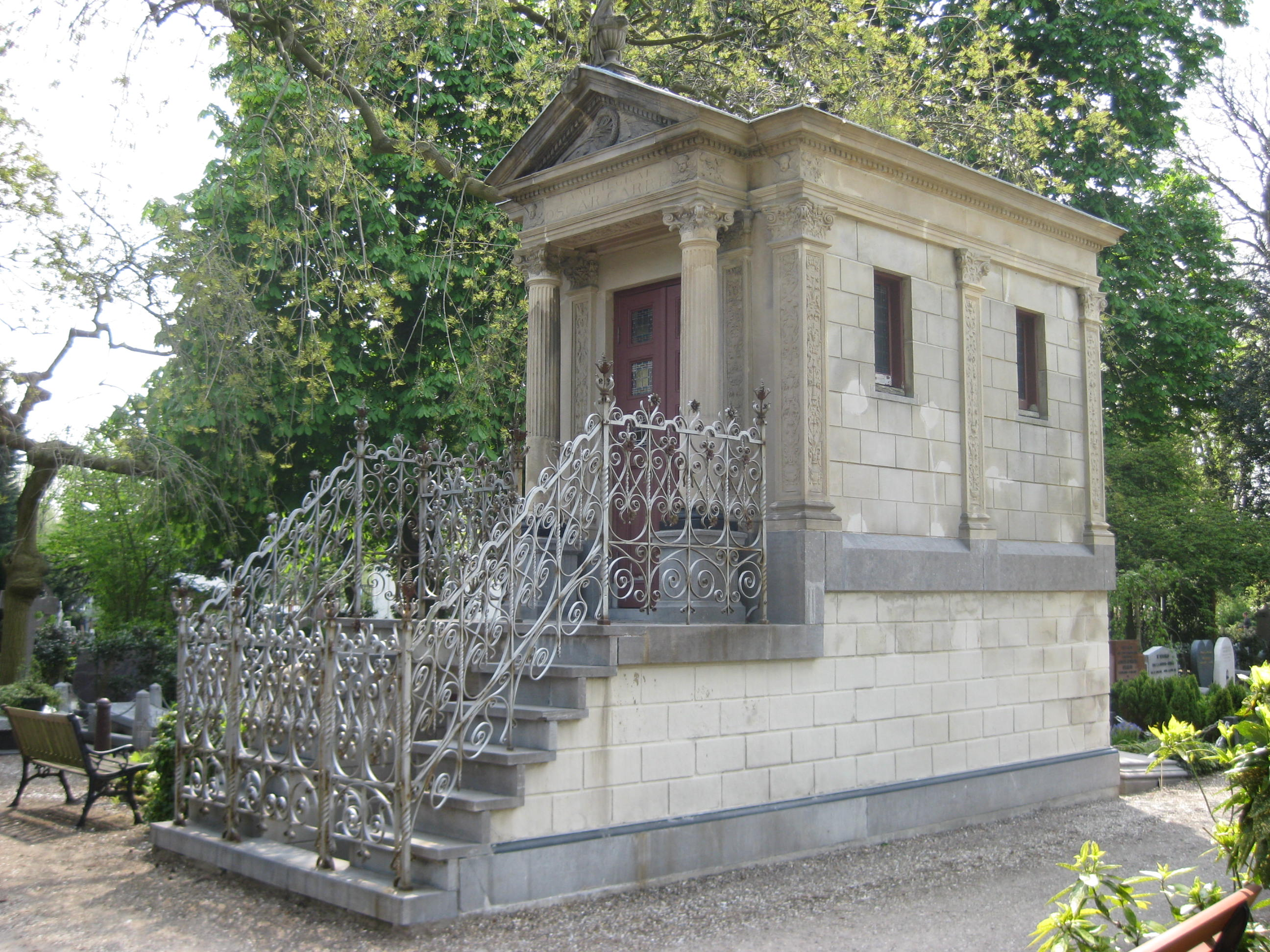 Rijksmonument: het mausoleum van Oscar Carré op begraafplaats Zorgvlied in Amsterdam